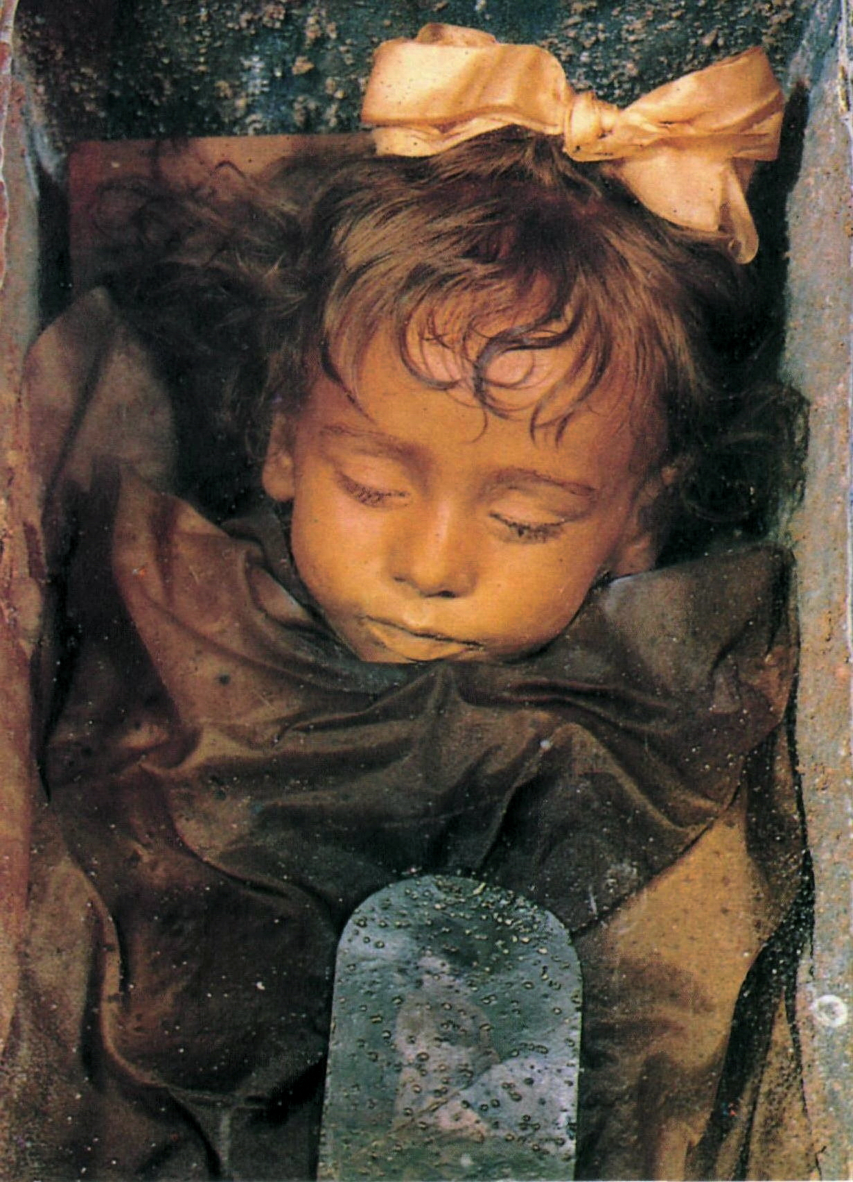 La mummia della bimba Rosalia Lombardo (1918-1920) esposta nel Cimitero dei Cappuccini a Palermo.